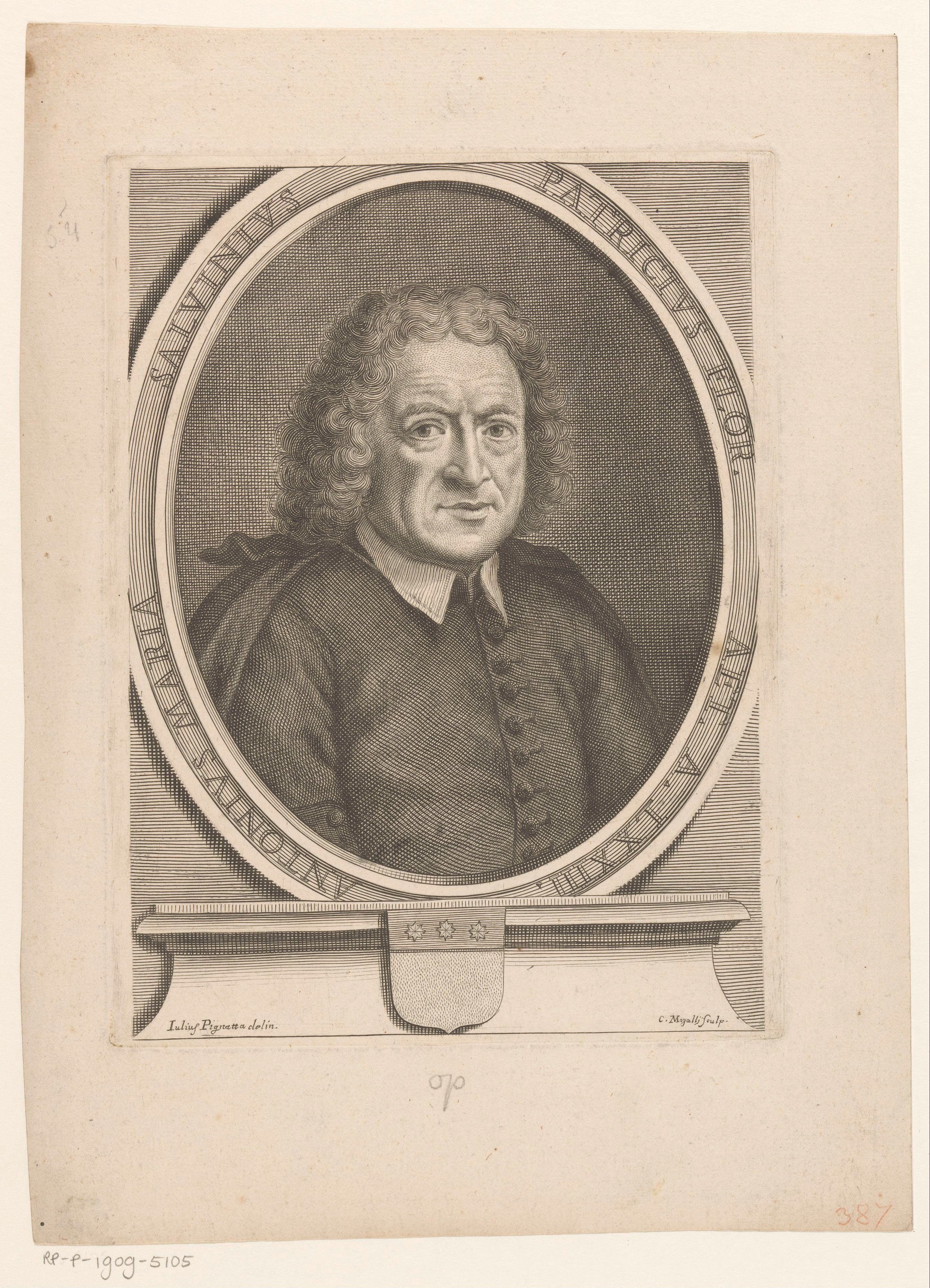 IdentificatieTitel(s): Portret van hellenist Anton Maria SalviniObjecttype: prent Objectnummer: RP-P-1909-5105Opschriften / Merken: verzamelaarsmerk, verso, gestempeld: Lugt 2228verzamelaarsmerk, verso, gestempeld: Lugt 2710VervaardigingVervaardiger: prentmaker: Cosimo Mogalli (vermeld op object)naar tekening van: Giulio Pignatta (vermeld op object)Plaats vervaardiging: ItaliëDatering: 1677 - 1730Fysieke kenmerken: gravure en etsMateriaal: papier Techniek: graveren (drukprocedé) / etsenAfmetingen: plaatrand: h 221 mm × b 167 mmOnderwerpWat: historical personsWie: Anton Maria SalviniVerwerving en rechtenVerwerving: aankoop 1905Copyright: Publiek domein